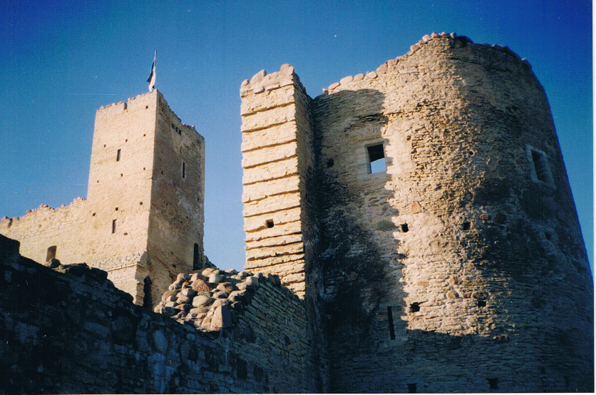 Burcht Rakvere (eigen foto Fransvannes)